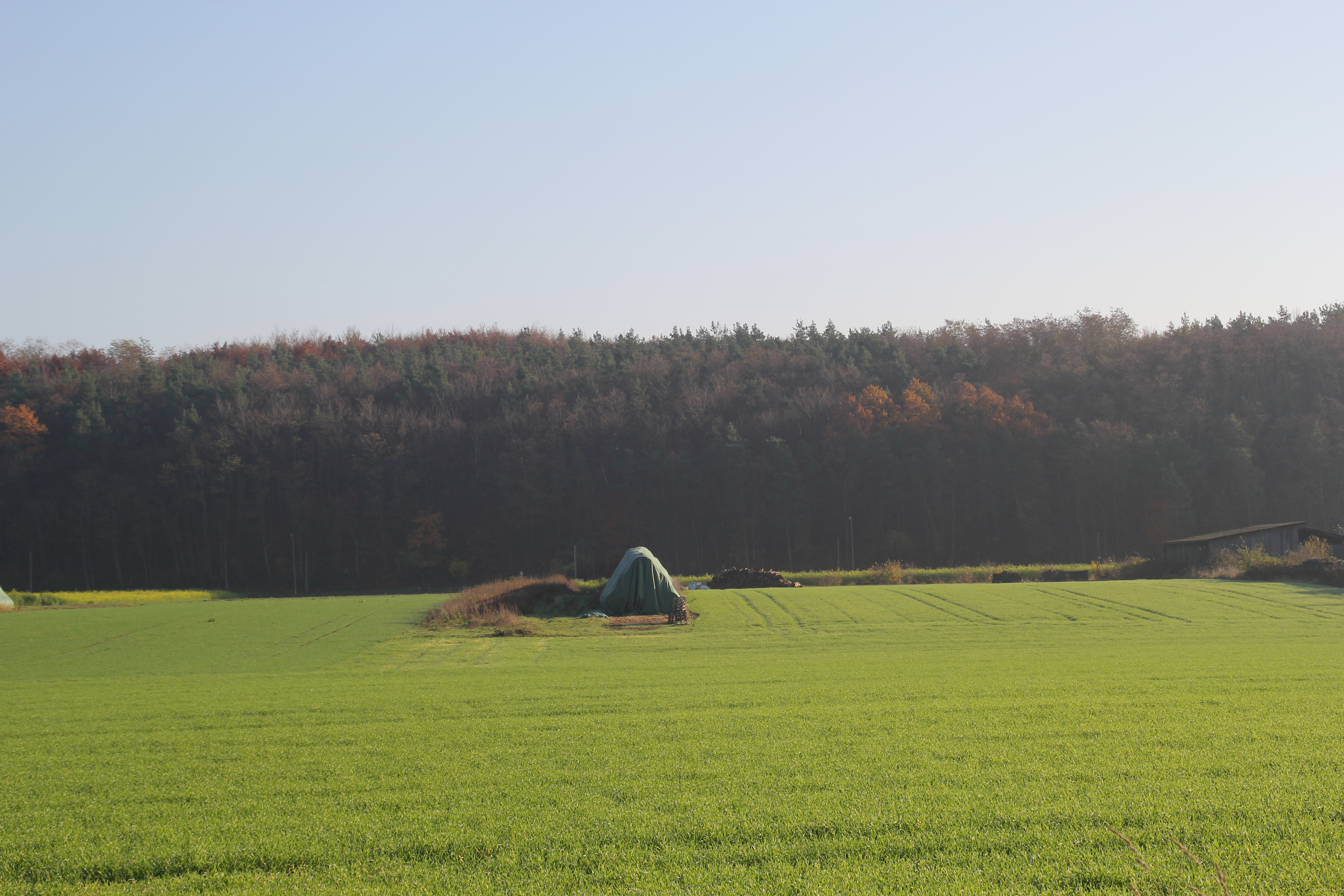 Kipp bei Großwelzheim. Es ist der ehemalige Abraum aus der zeche Gustav (heute Gustavsee)